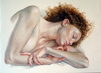 Le tableau représente une jeune femme à la chevelure rousse et bouclée en train de dormir couchée sur le côté gauche.